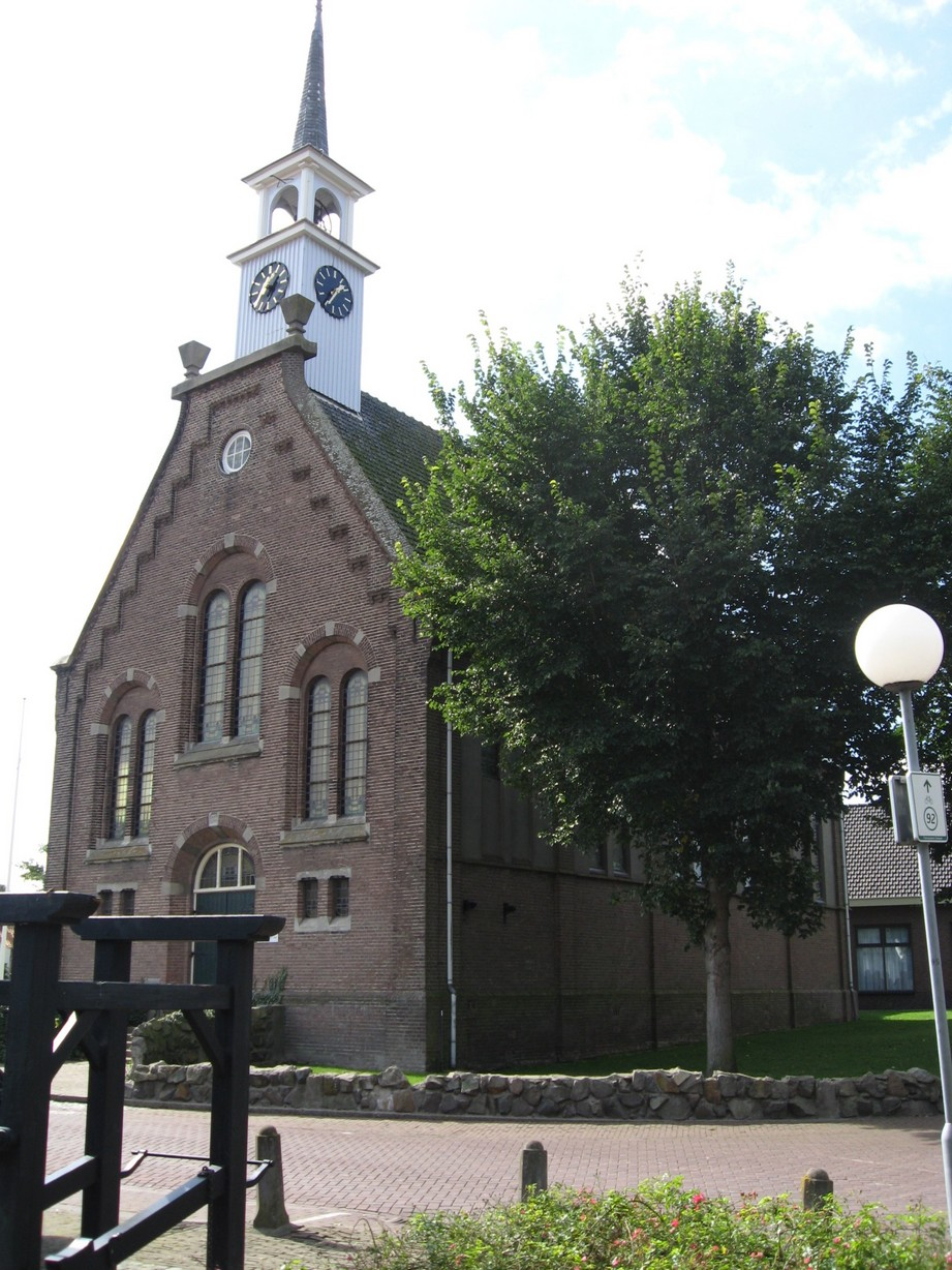 Church in Kerkwerve (Schouwen-Duiveland)